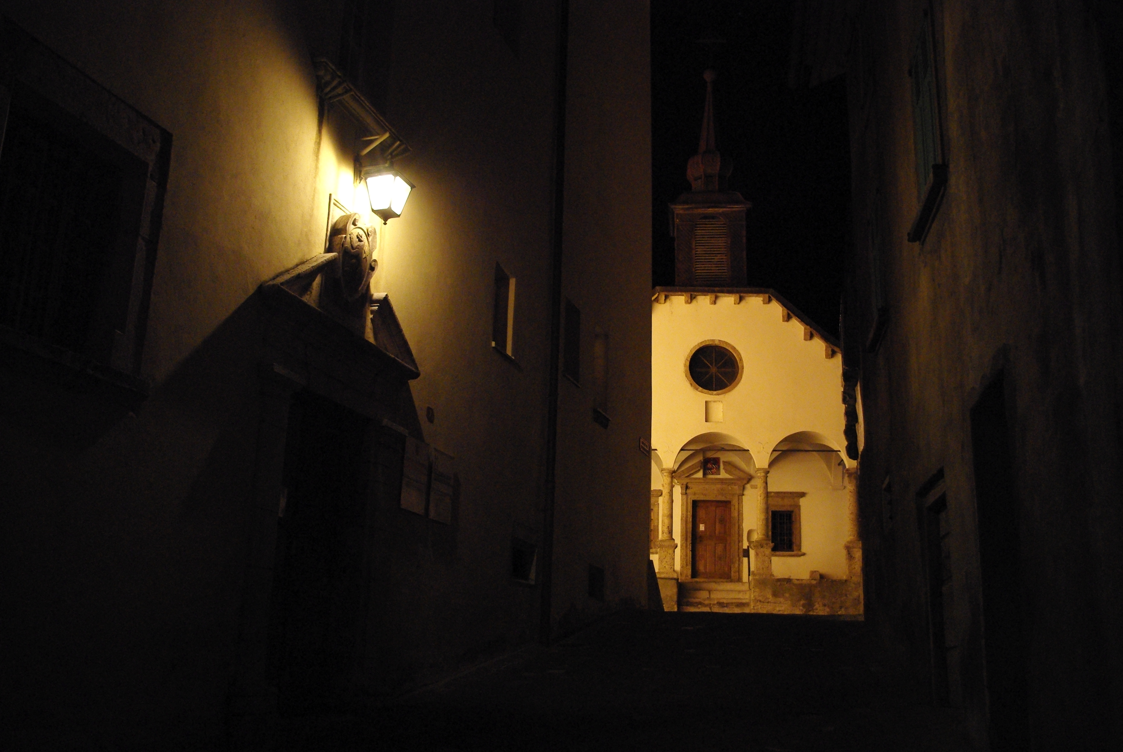 Vue de nuit de la Chapelle de la Sainte-Famille de Saint-Gingolph